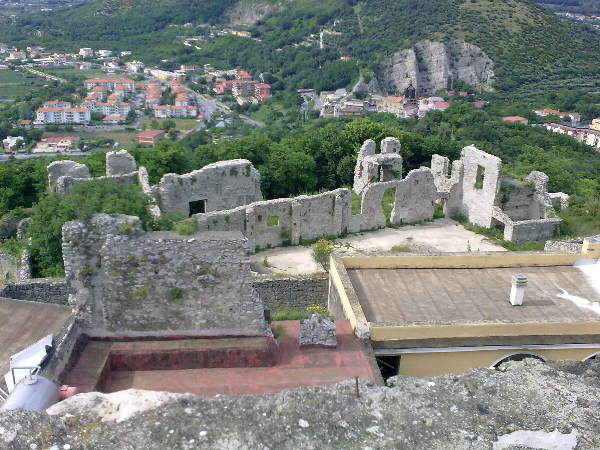 Ruderi del Castello del Parco di Nocera Inferiore visti dalla torre